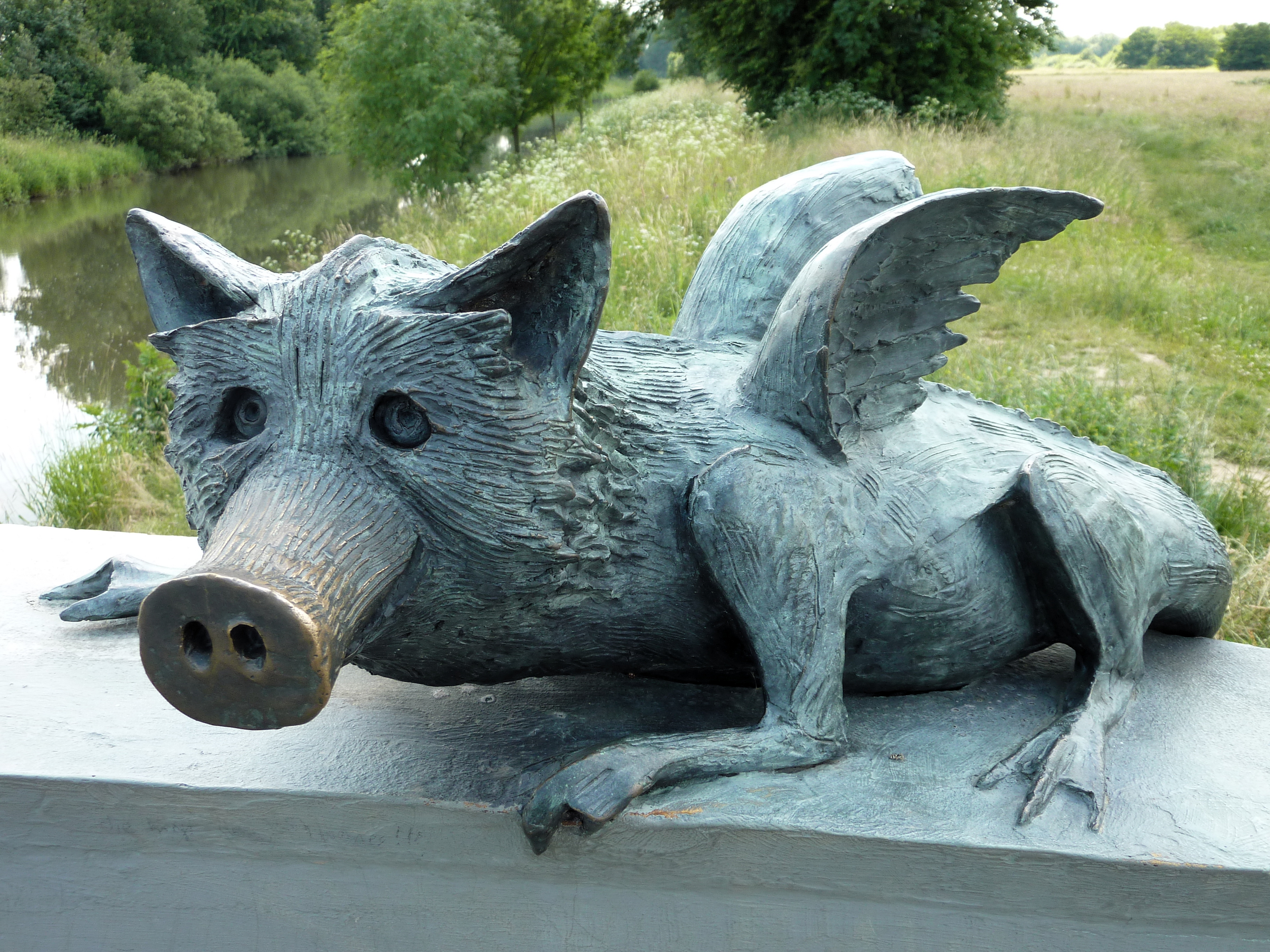 Frankfurt am Main: Das Grüngürteltier, von Robert Gernhard entworfene Sympathiefigur für das Naturschutz-, Landschaftsschutz- und Naherholungsgebiet Frankfurter Grüngürtel. Bronzeskulptur auf der Balustrade der Robert-Gernhardt-Brücke beim Alten Flugplatz Bonames. Blick nach Südwesten, links im Bildhintergrund der Fluss Nidda.